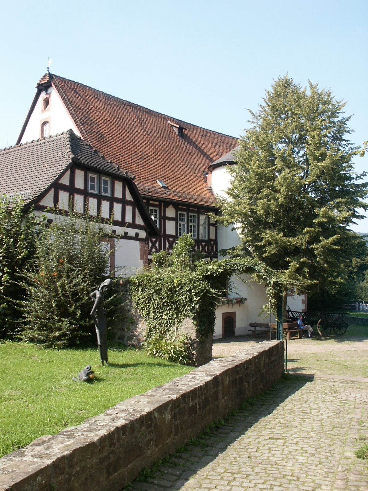 Museum "Brüder Grimm Haus" mit Skulptur zum "Froschkönig" in Steinau